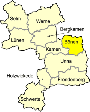 Lage der Gemeinde Bönen im Kreis Unna